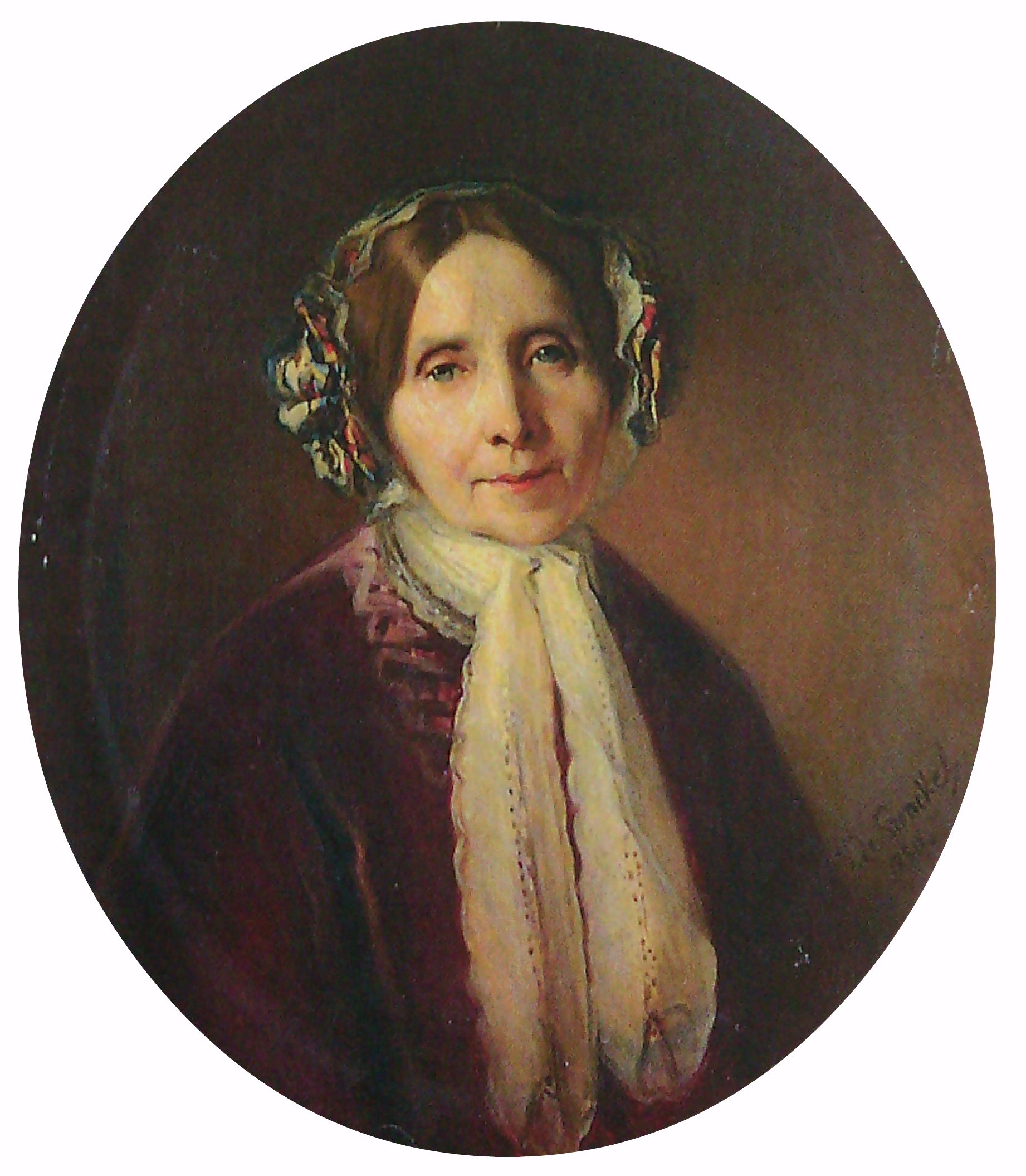 Мария Васильевна Танеева, ур. Ханыкова (1786—1850)